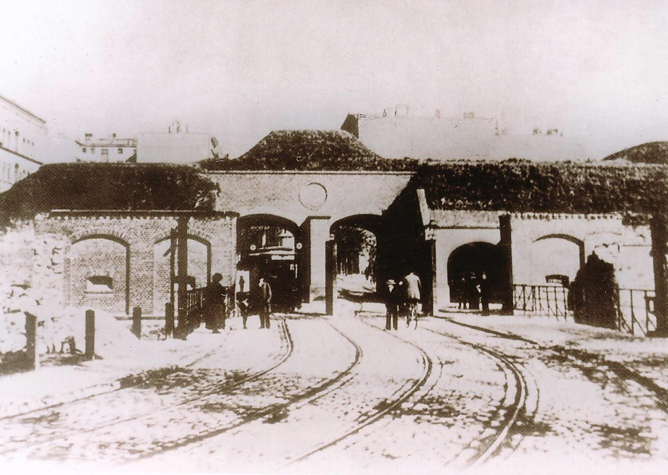 Buckauer Tor der Festung Magdeburg, aufgenommen während des Abrisses im Jahr 1899, Blick von Süden, im Hintergrund heute noch bestehende Bebauung der Sternstraße zu erkennen